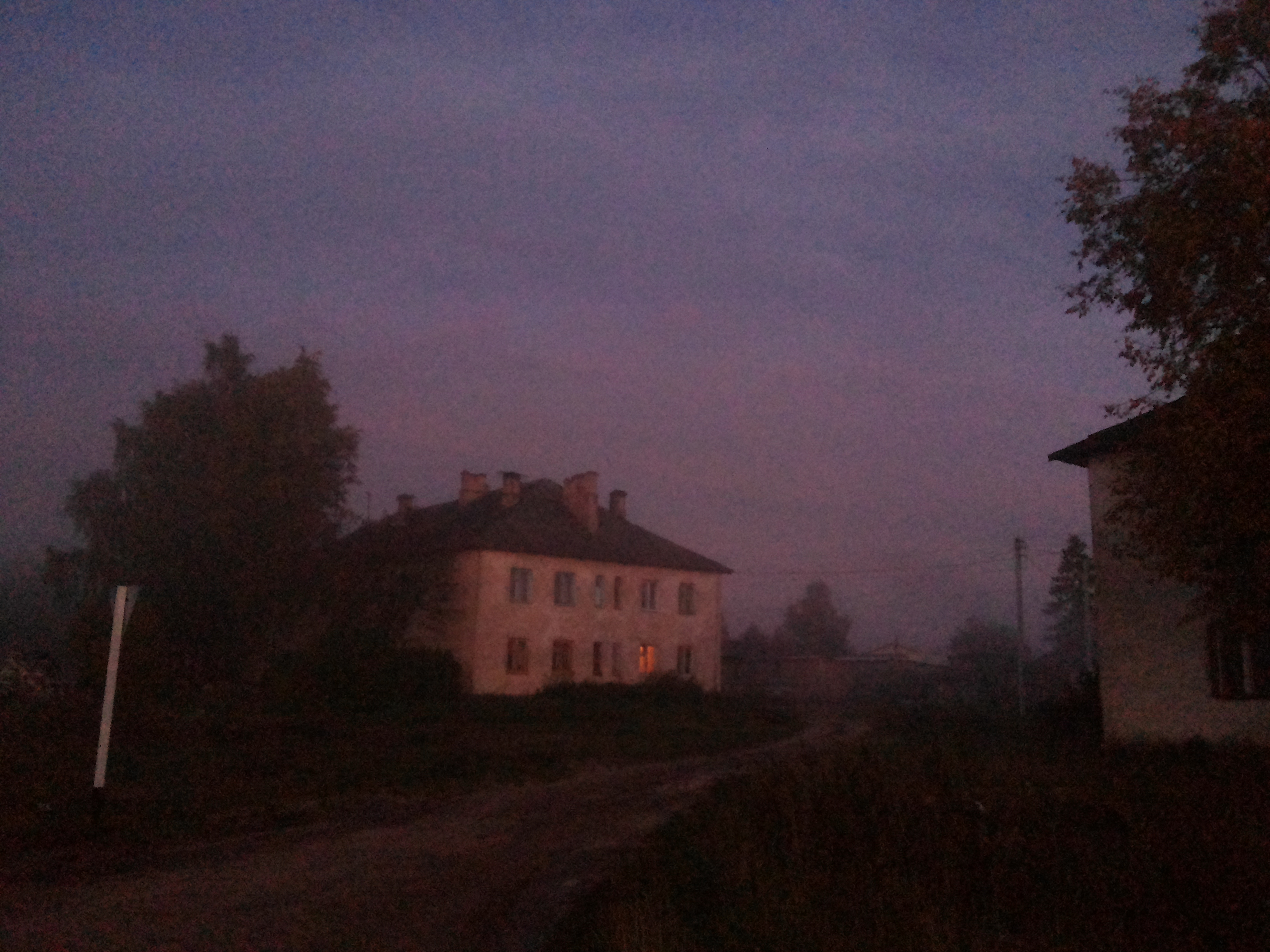 Вид на двухэтажные дома советских времен в деревне Партизанская Полновской волости Гдовского района Псковской области